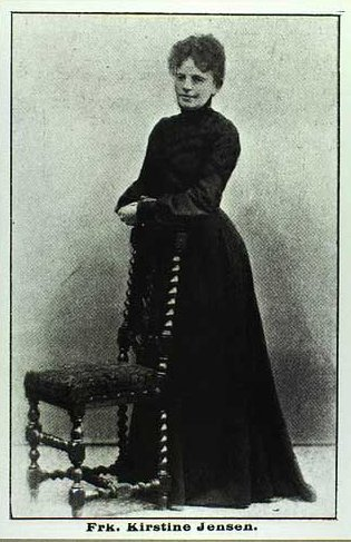 Kristine Marie Jensen bedre kendt som Frøken Jensen (17. juli 1858 i Randers - 7. februar 1923 i København). Kogebogsforfatterinde